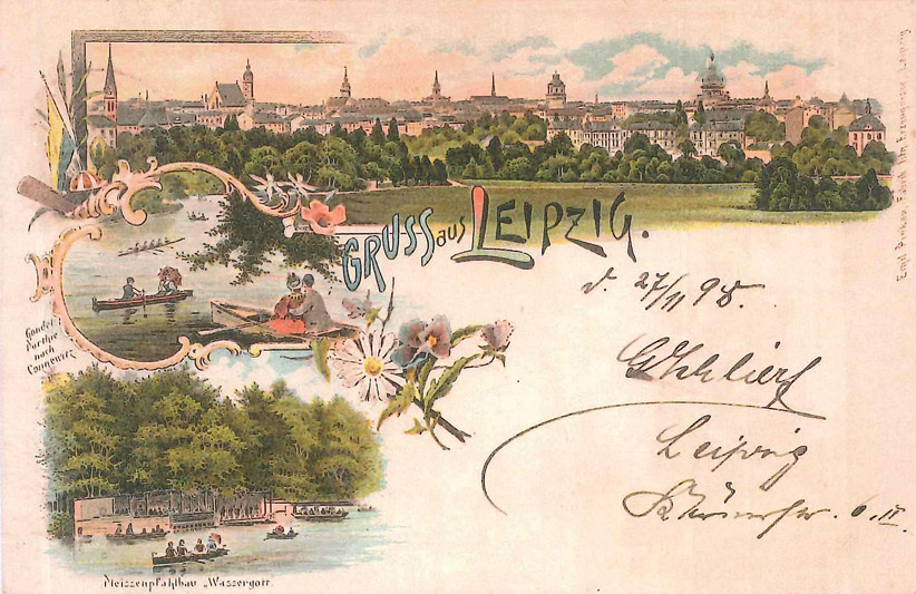 Lithographische Kunstanstalt Emil Pinkau: Ansichtskarte "Gruss aus Leipzig". Chromolithographie, 10 x 15 cm, 1898